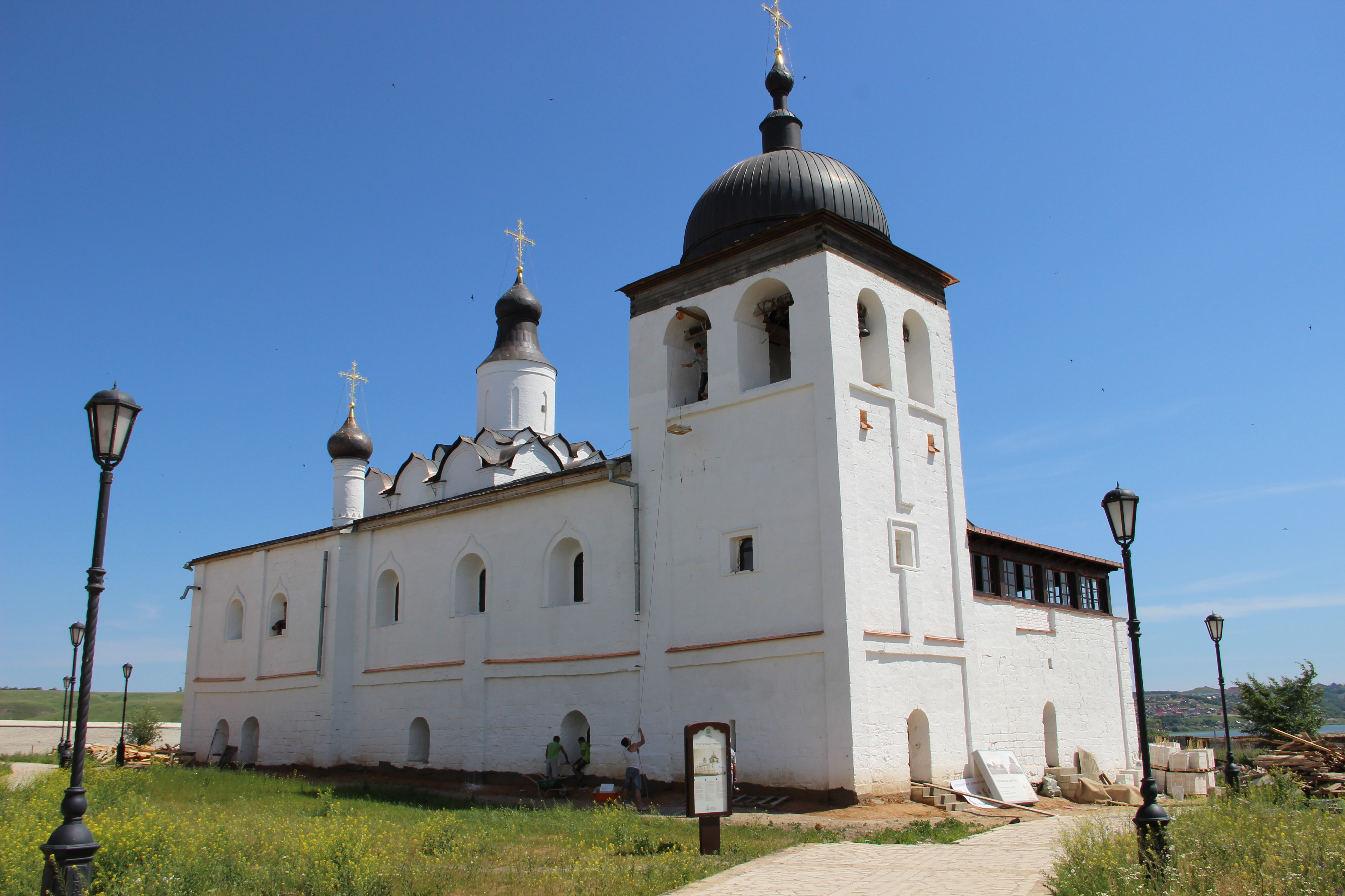 Сергиевская церковь 1604 г. Иоанно-Предтеченский монастырь. Остров-град Свияжск. РТ. Июнь 2013